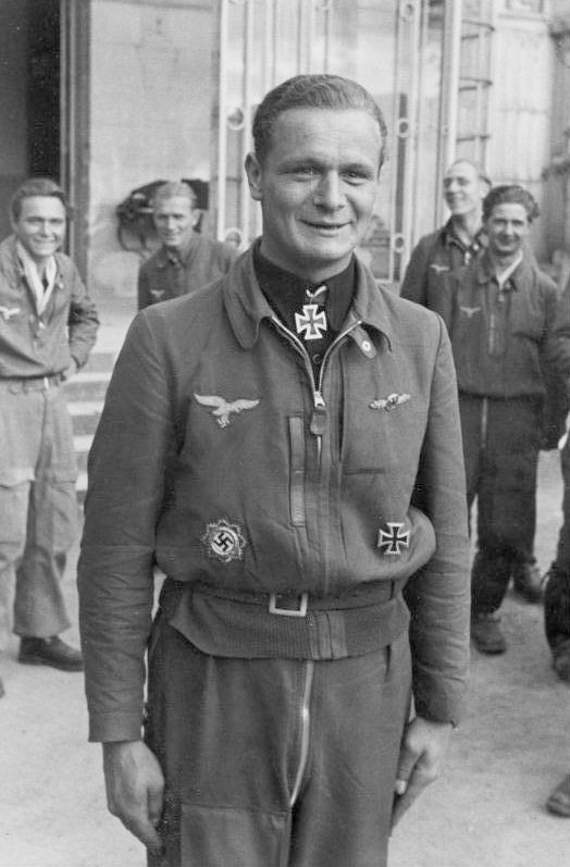 Siegfried Lemke LW. KB. Zug 6, LW. KB-Abt. b. Lfl. 3, Film: 3369/21 Bild u. Text: Lt. Hirsch, Ort: Nordfrankreich, 14.6.1944 Leutnant Lemke, Flugzeugführer im Jagdgeschwader Richthofen, 23 Jahre alt, erhielt dieser Tage an der Invasionsfront nach seinem 45. Luftsieg das Ritterkreuz verliehen. [Scherl Bilderdienst] [Leutnant Siegfried Lemke mit Ritterkreuz] Abgebildete Personen: Lemke, Siegfried: Leutnant, Ritterkreuz (RK), Luftwaffe, Deutschland